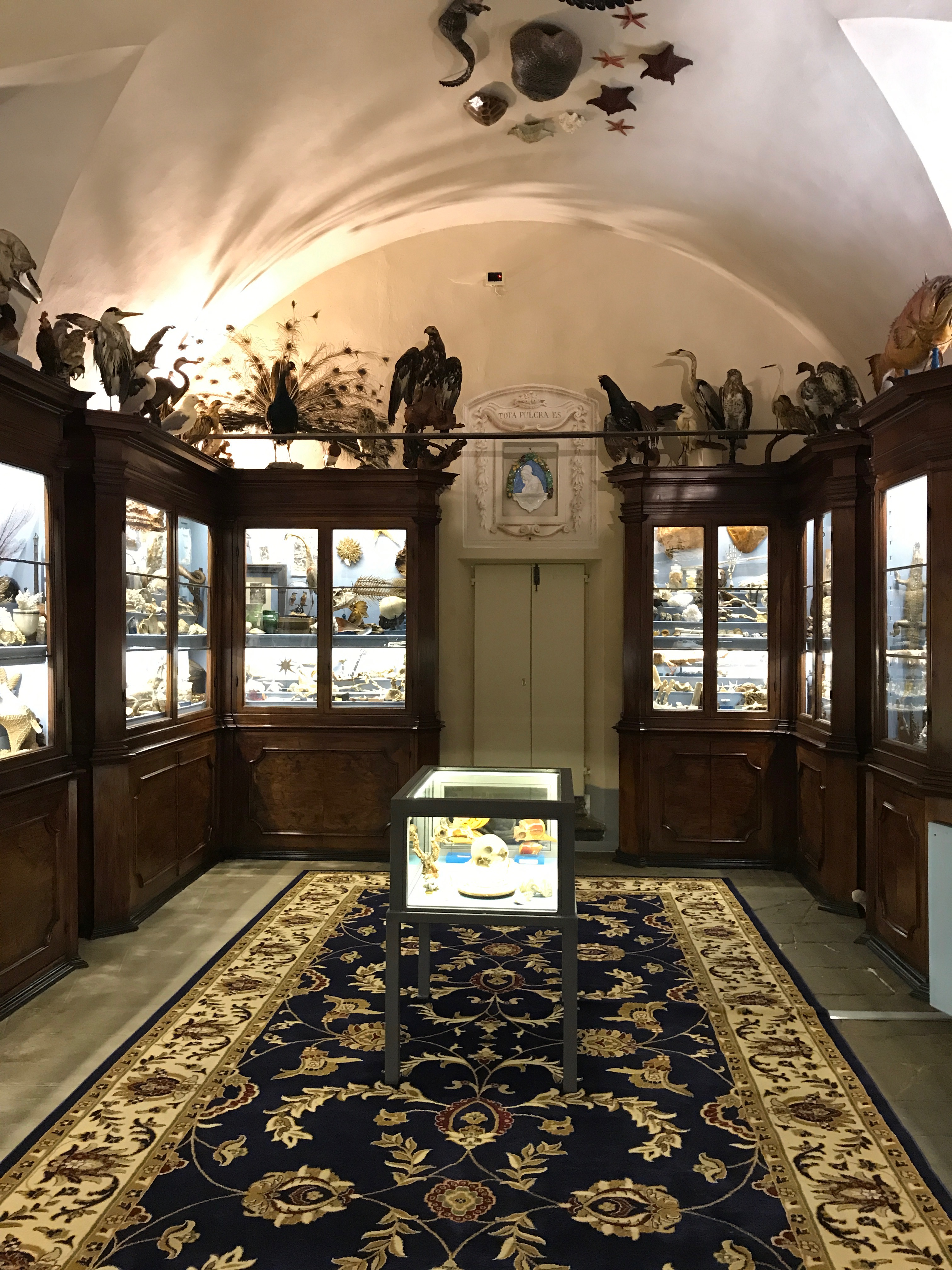 Nuova Wunderkammer del Museo di storia naturale dell'Università di Pisa